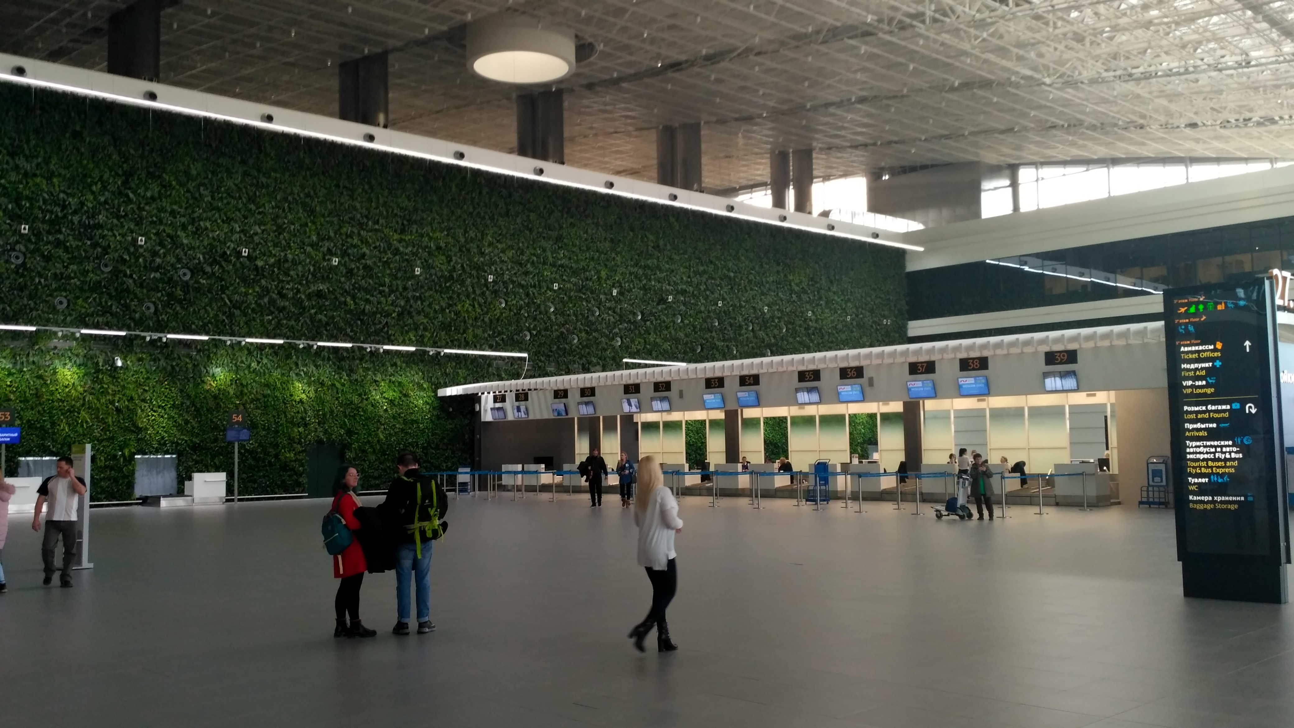 Второй остров регистрации нового терминала аэропорта Симферополь